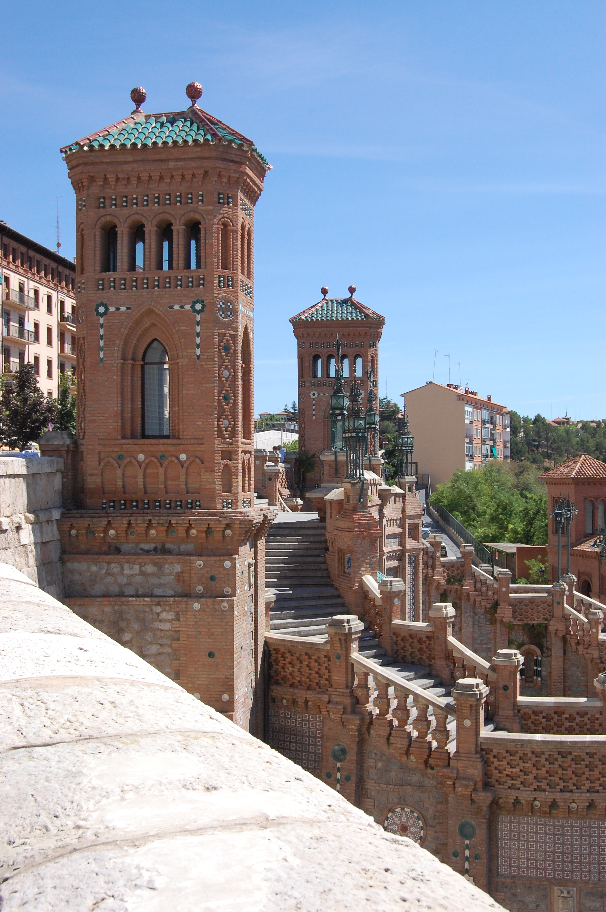 Escalinata neomudejar (Teruel)